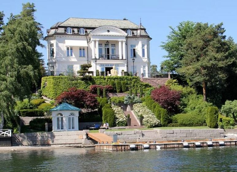 Pausvillaen (1907), Christian Benneches vei 6, Bygdøy, Oslo